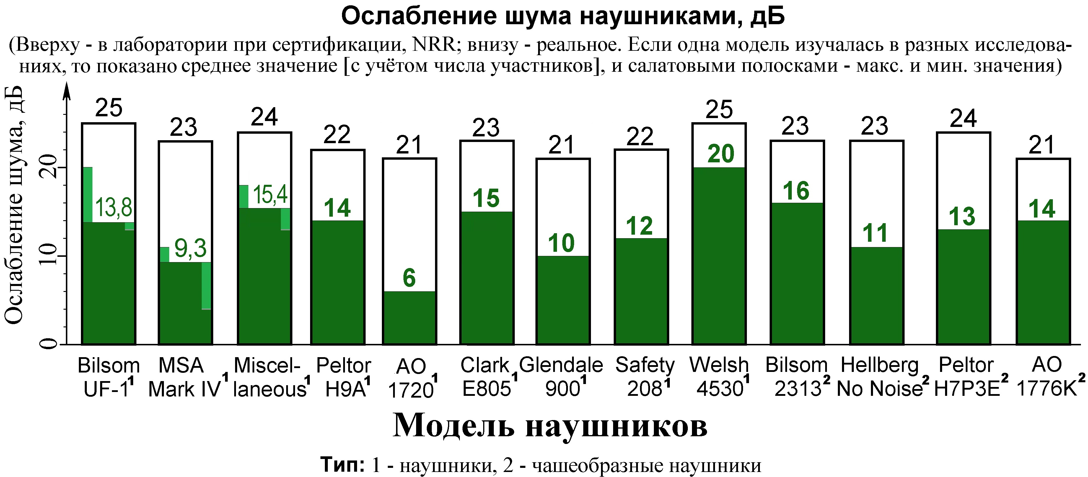 Иллюстрация к документу NIOSH, показывающая несоответствие лабораторной (сертификационной) эффективности средств индивидуальной защиты органа слуха (СИЗОС) и реальной (для наушников). Диаграмма построена на основании информации из таблицы 6-1 из Occupational Noise Exposure. Revised Criteria 1998